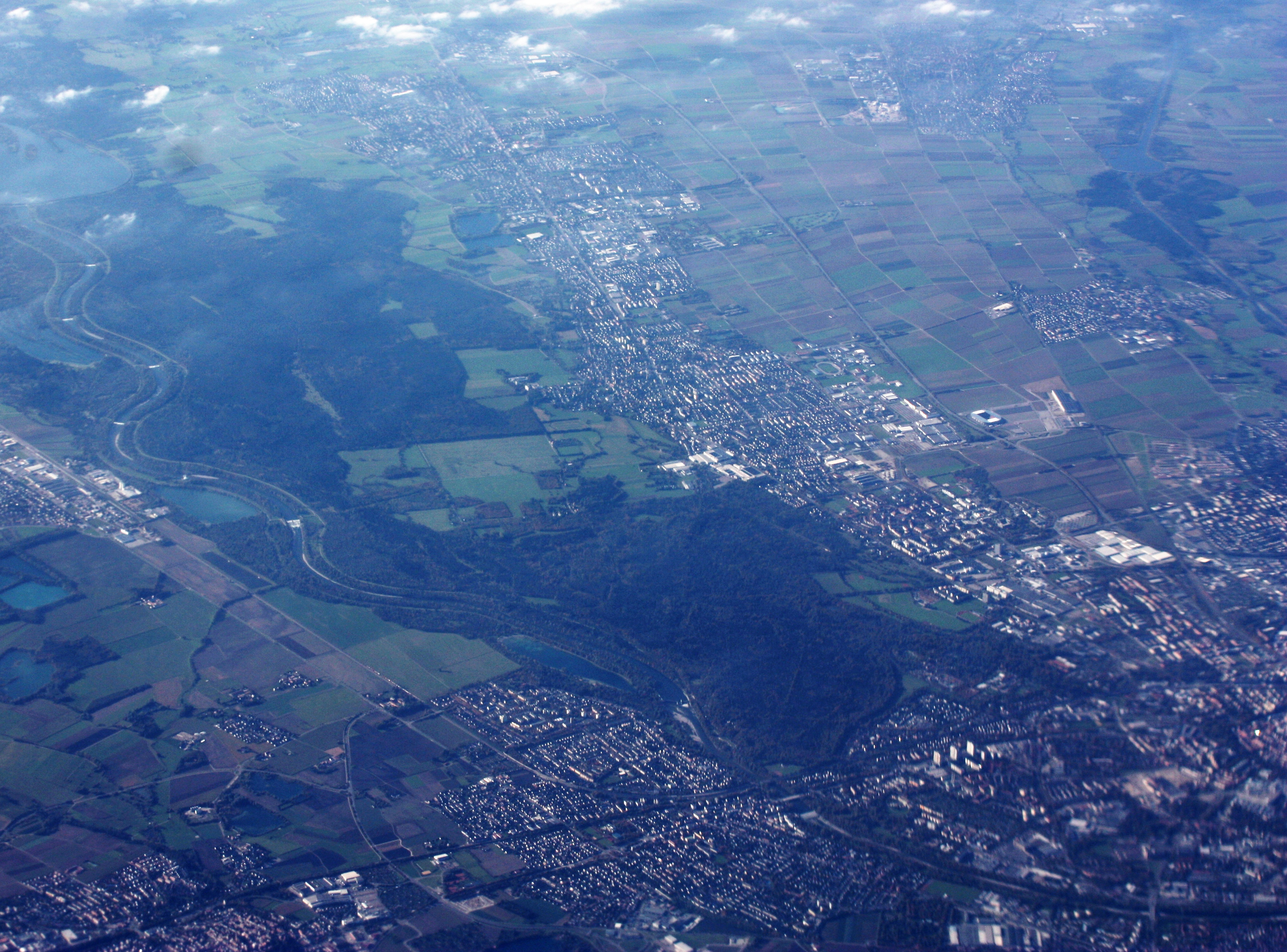 Flug von Frankfurt/Main nach Sofia; Start 10:12 MEZ; Landung 13:06 MEZ; Oktober 2010; Augsburg